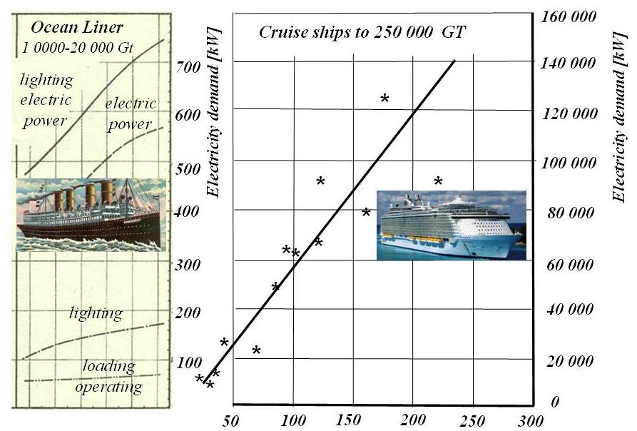 Passagierschiffe, E-Bedarf um 1900 und um 2010